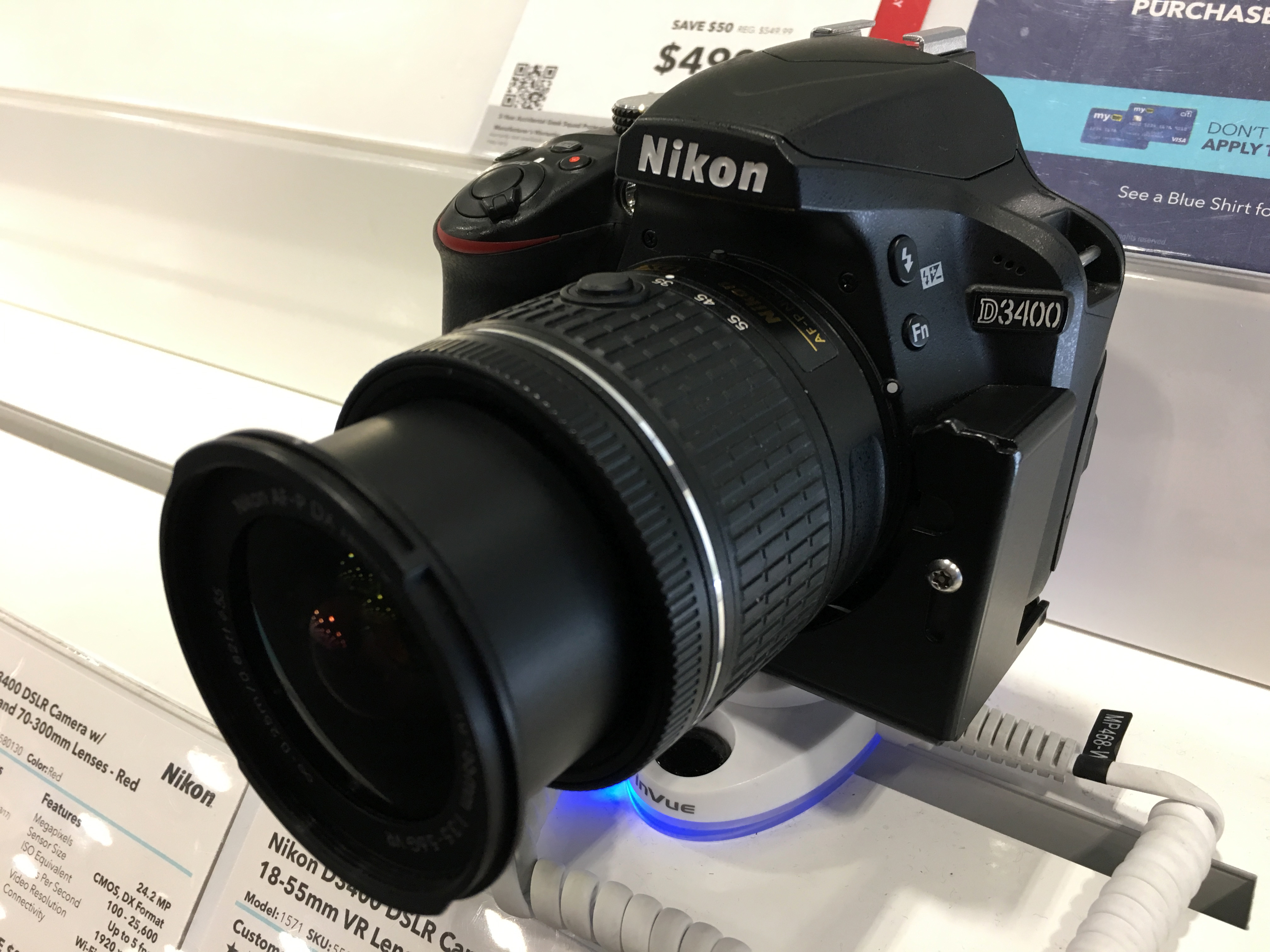 Nikon D3400